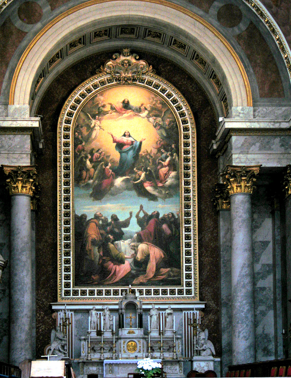 Hlavný oltár v ostrihomskej bazilike